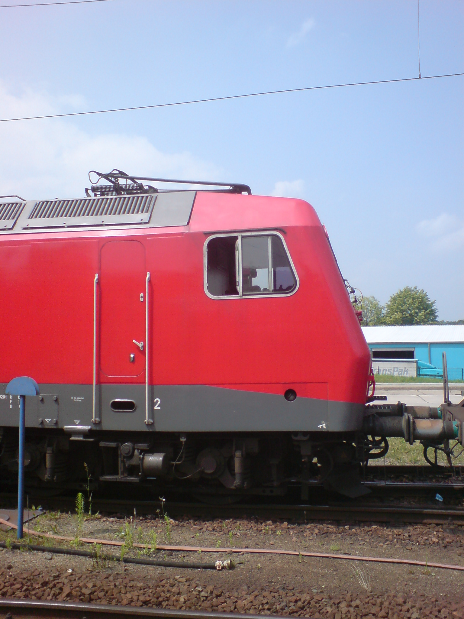 Detailaufnahme auf den Führerstand von MEG 804 (ehem. 156 004)